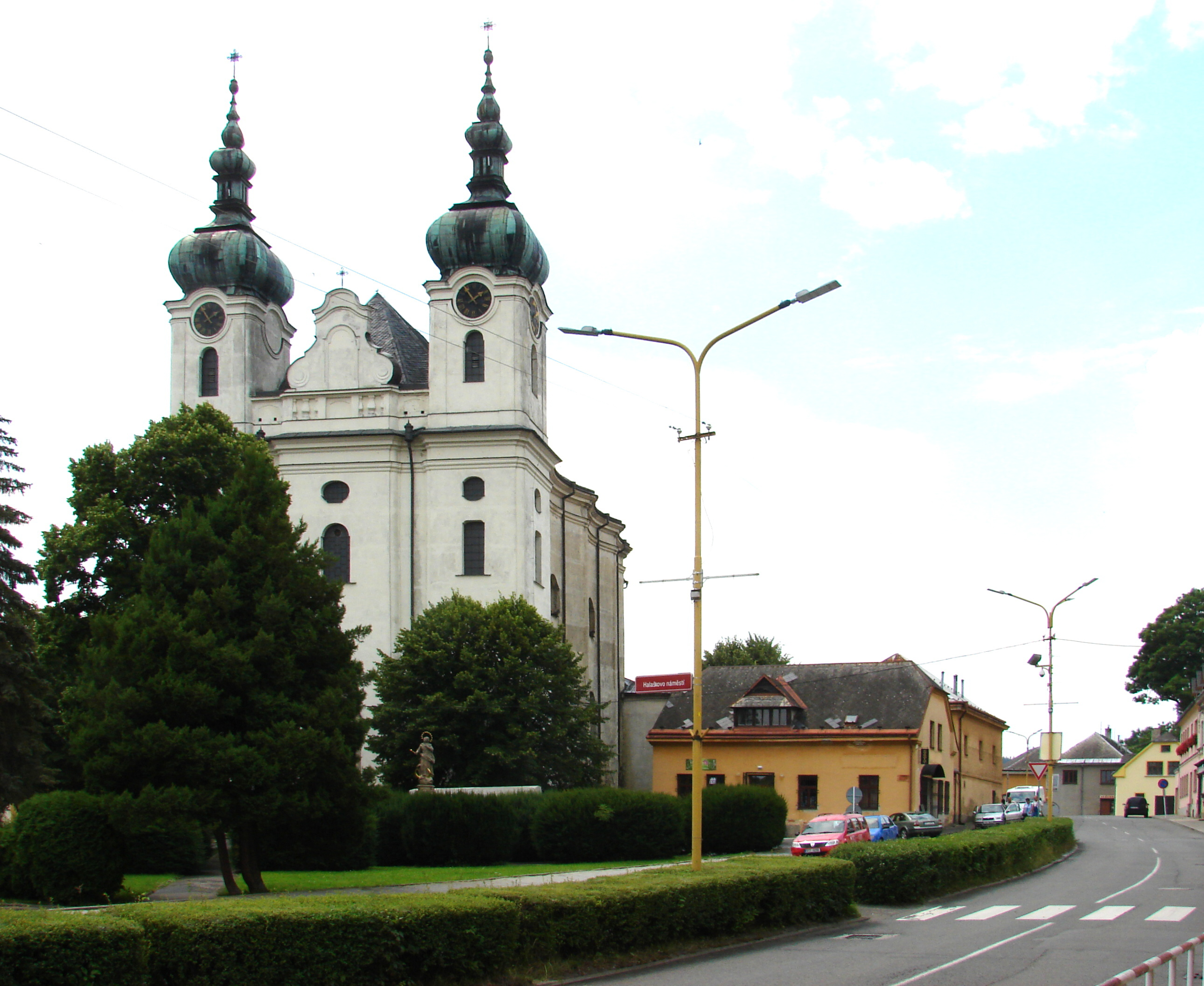 Kostel Nanebevzetí Panny Marie v Budišově nad Budišovkou.